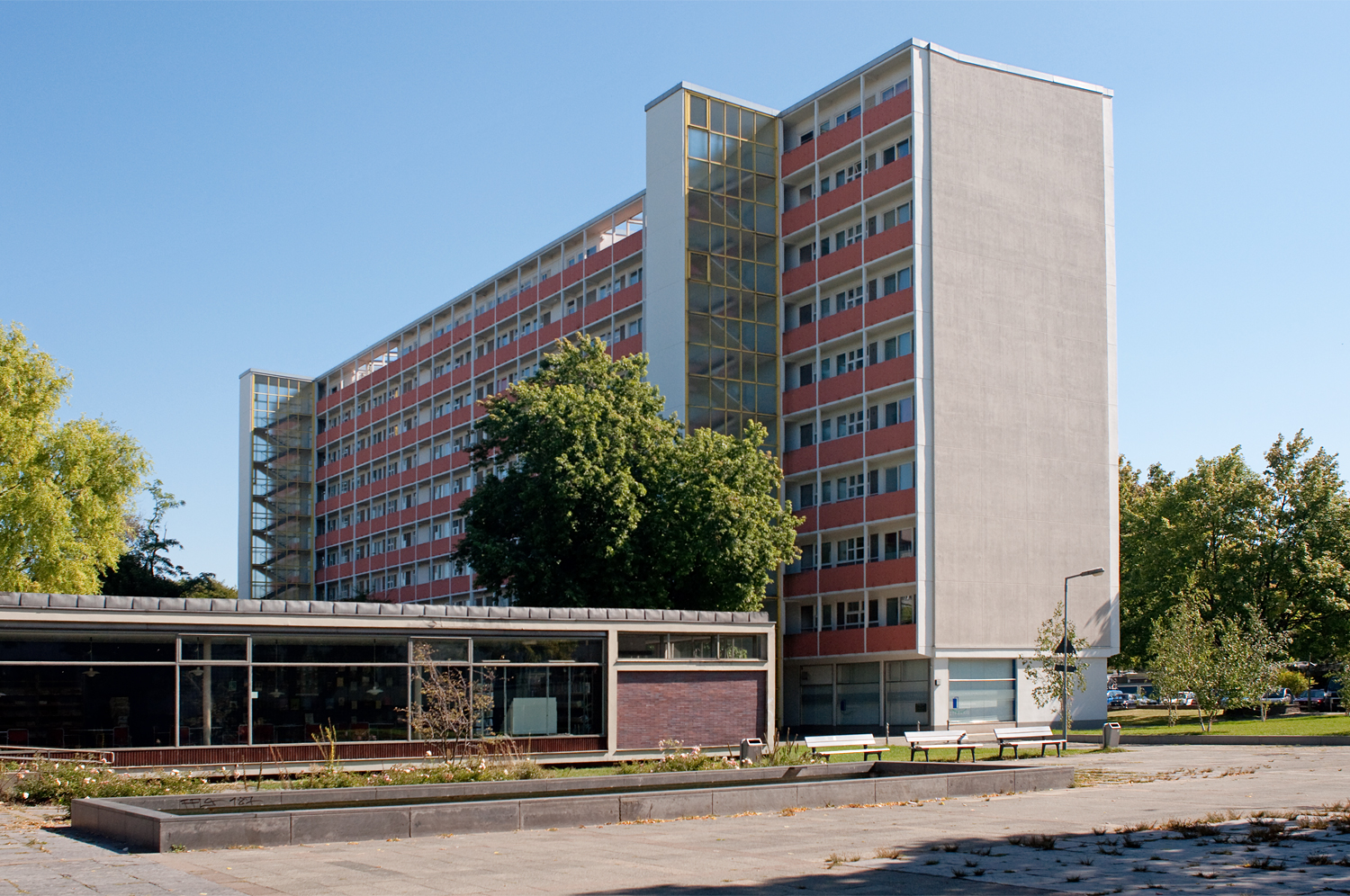 Hansabücherei und Wohnhaus Altonaer Straße 3/9 (Schwedenhaus)